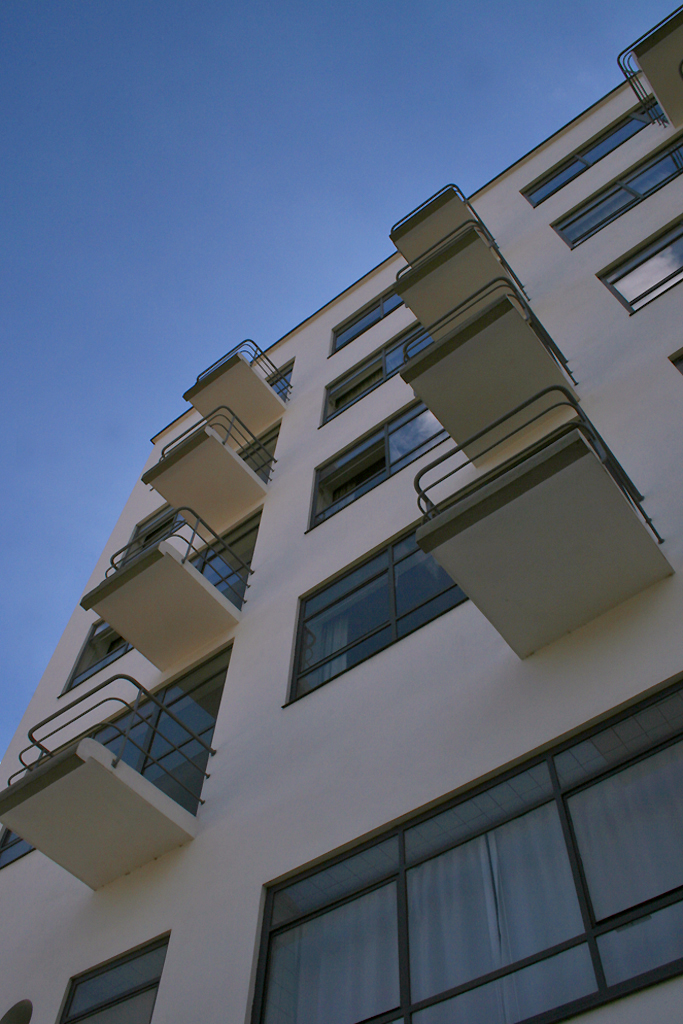 Dessau, Bauhaus